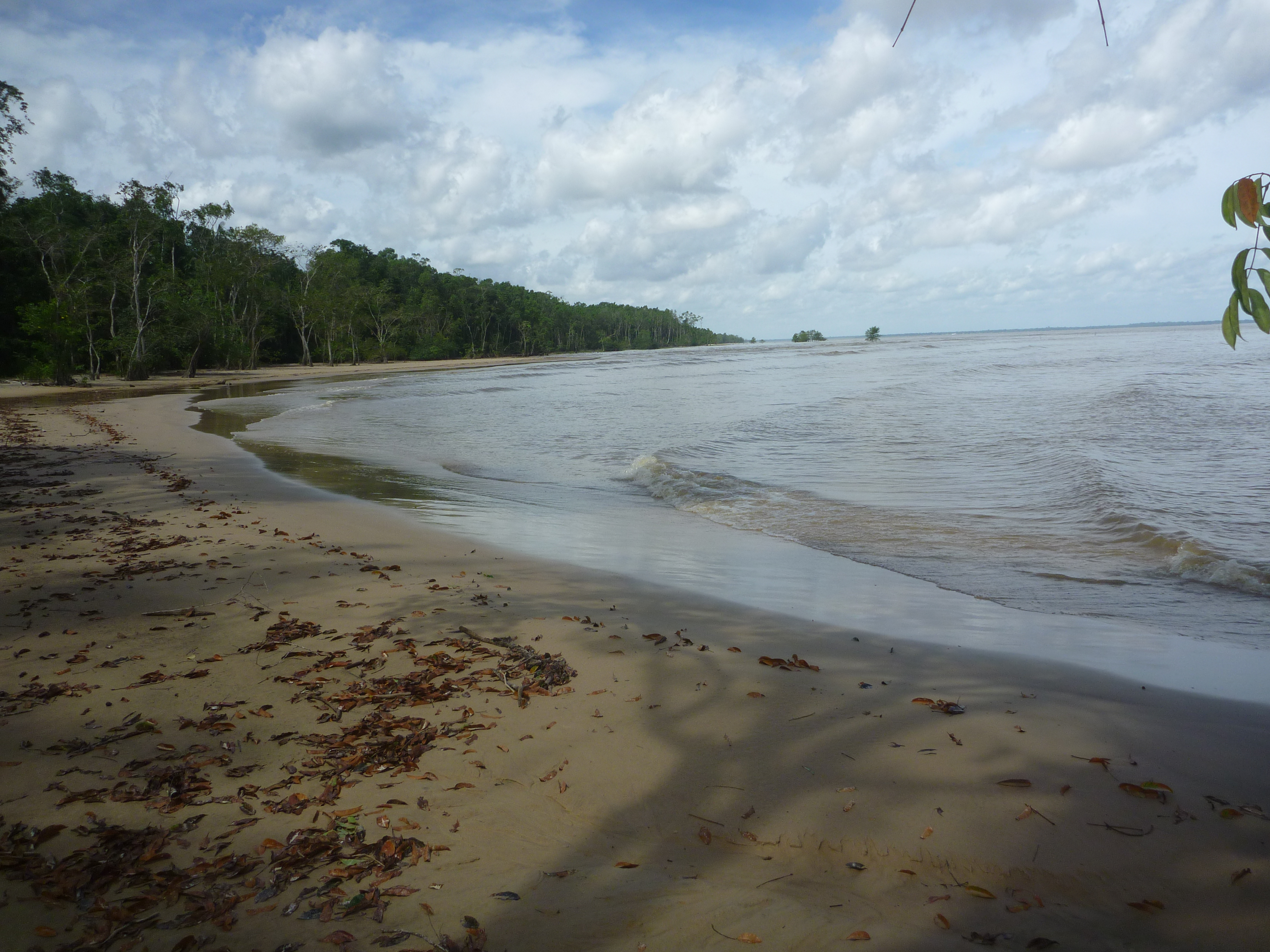 Praia do Machadinho: bela e selvagem.